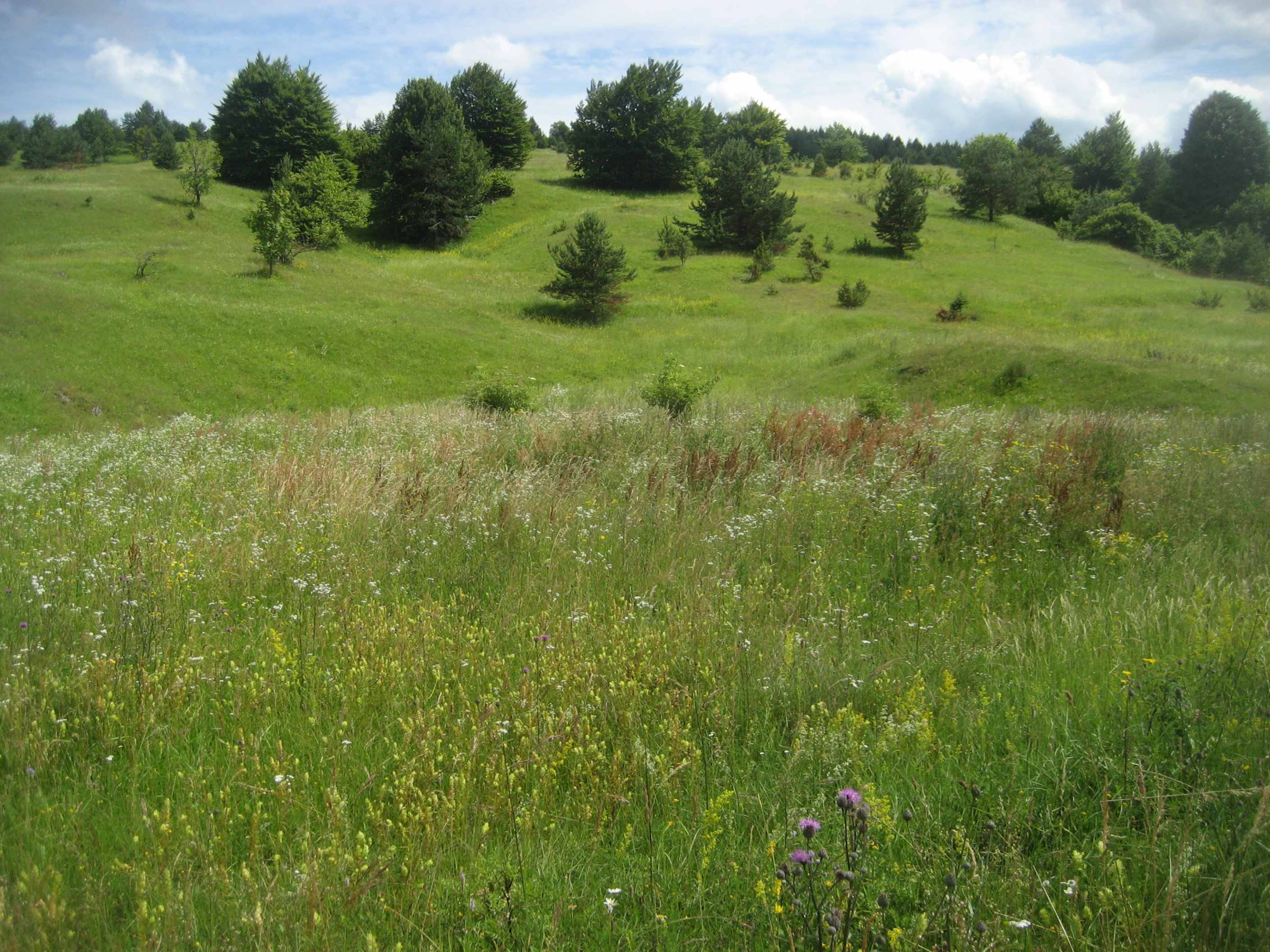 Blumenwiese in Zentralkroatien, historische Region Lika